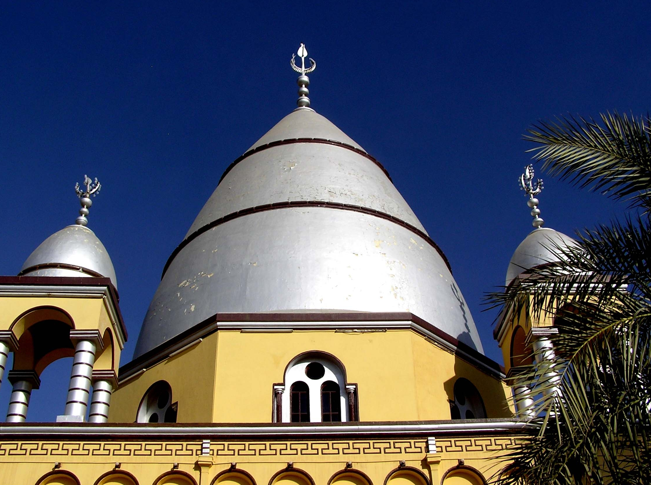 Mahdi's Tomb - Omdurman, Sudan